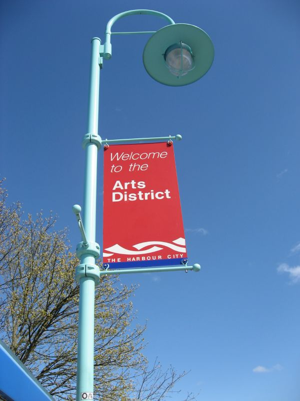 Nanaimo, BC